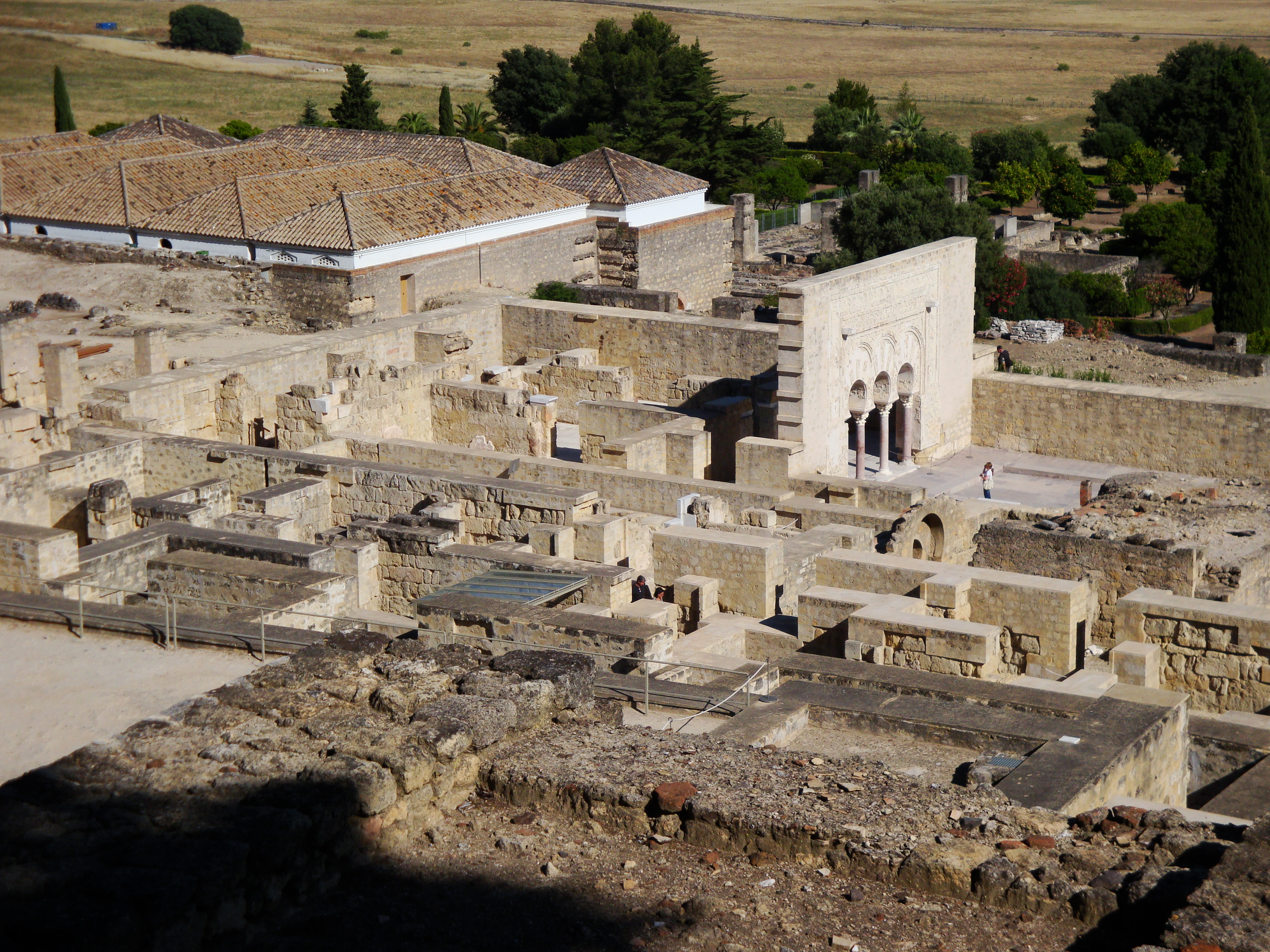 Medina Azahara, Córdoba (España).